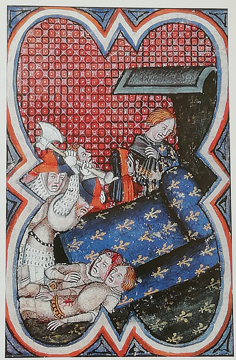 Massacre des maréchaux par les parisiens (1358). Étienne Marcel coiffe le roi Charles V du chaperon bleu et rouge des émeutiers